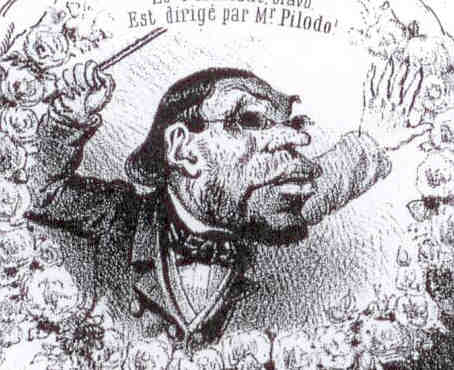 Portrait-caricature du compositeur et chef d'orchestre parisien Pilodo.